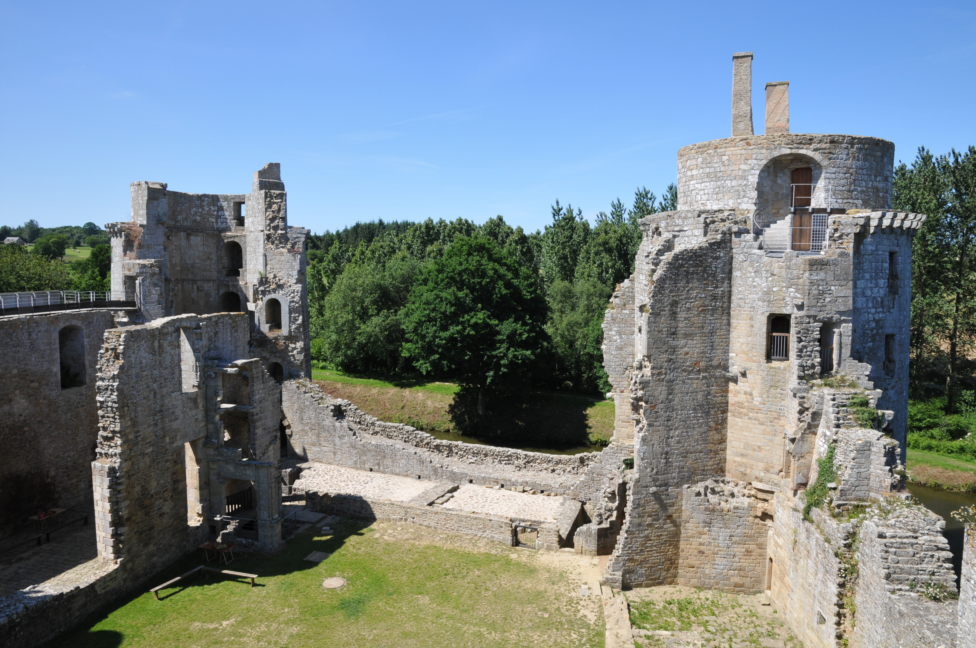 Innenansicht der nördlichen Seite der Burgruine La Hunaudaye, Frankreich